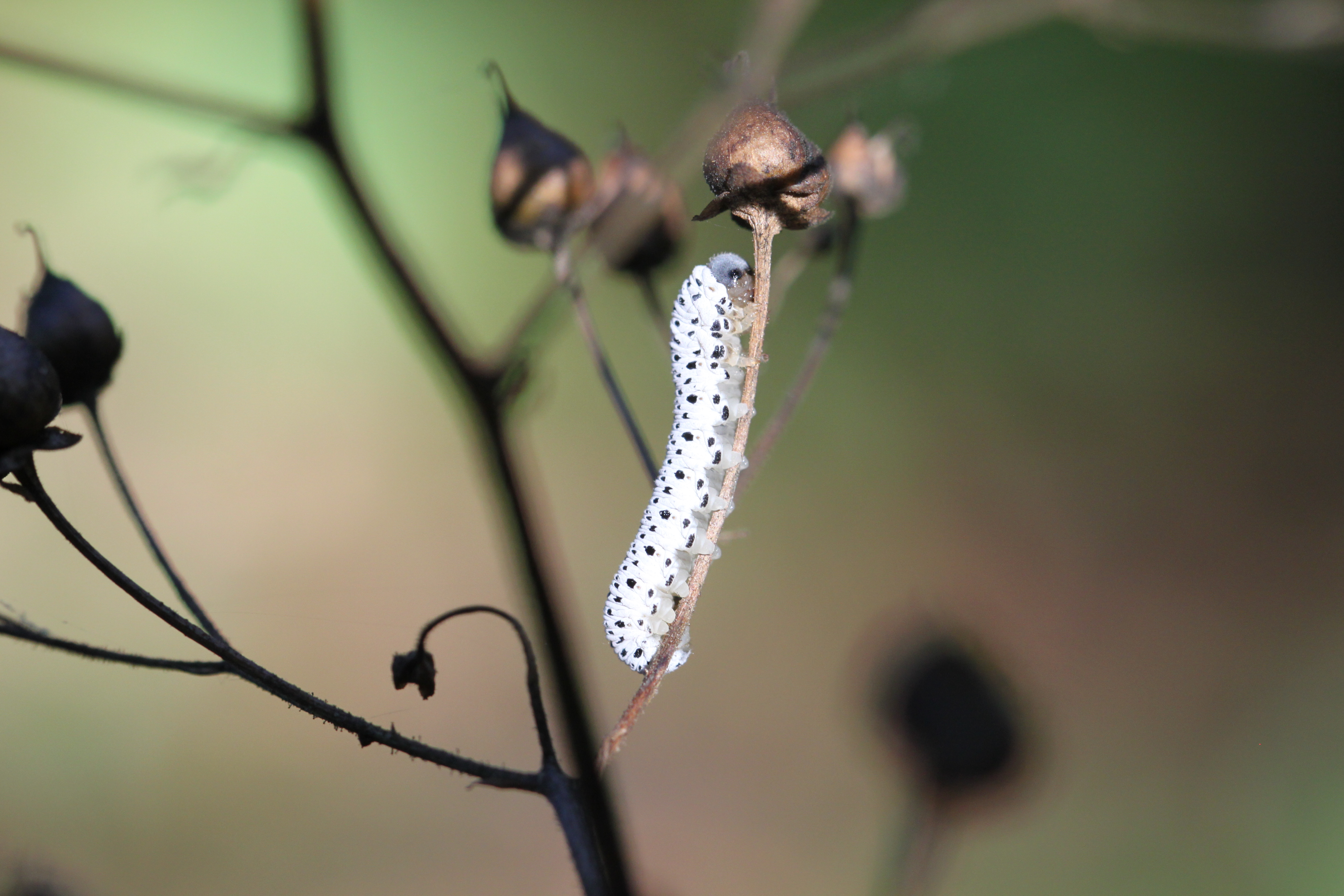 Afterraupe der Braunwurzblattwespe (Tenthredo scrophulariae) im Schwetzinger Hardt